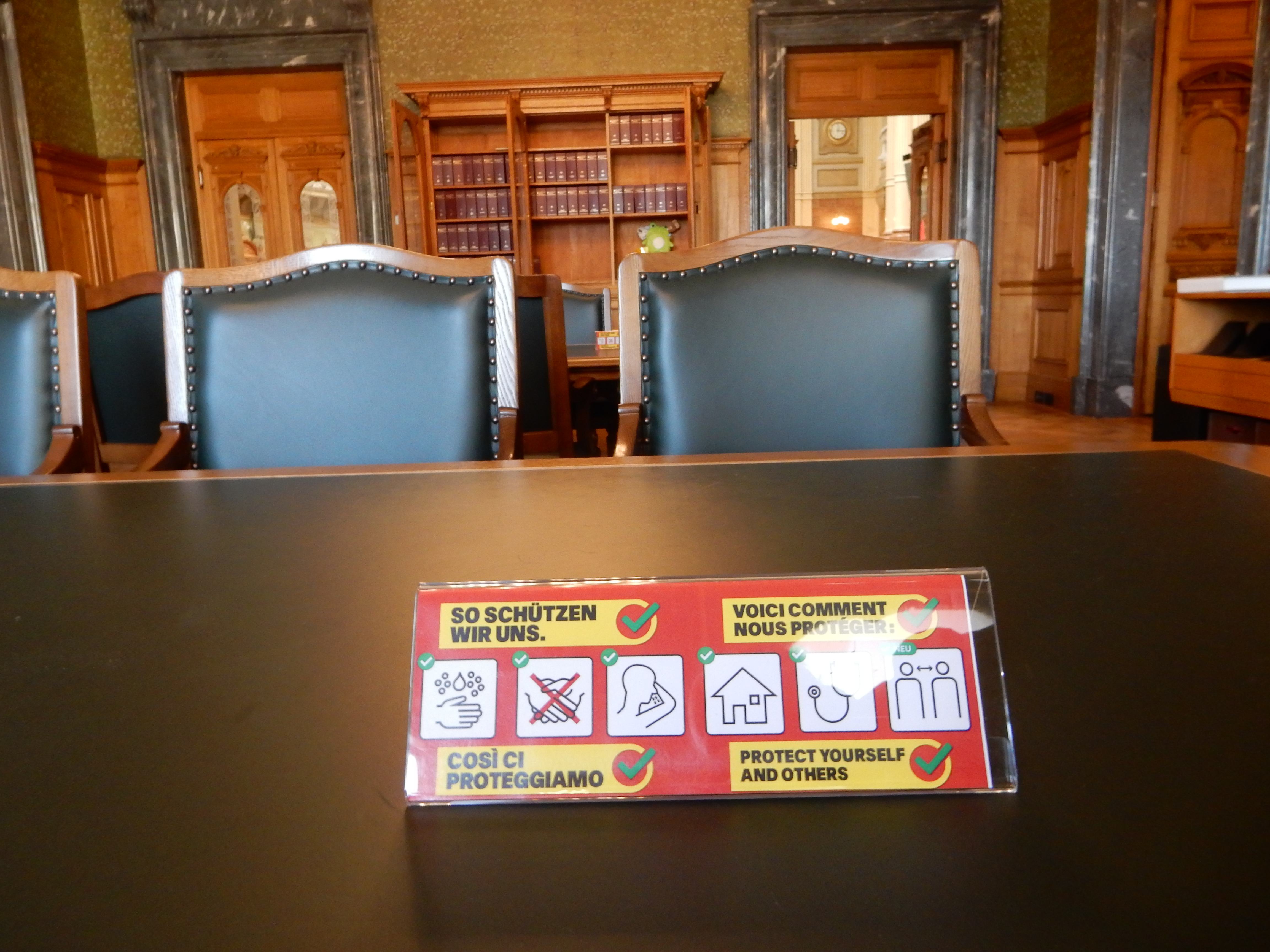 Corona-Schutzmassnahmen Schweiz: im Vorzimmer Nationalratssaal